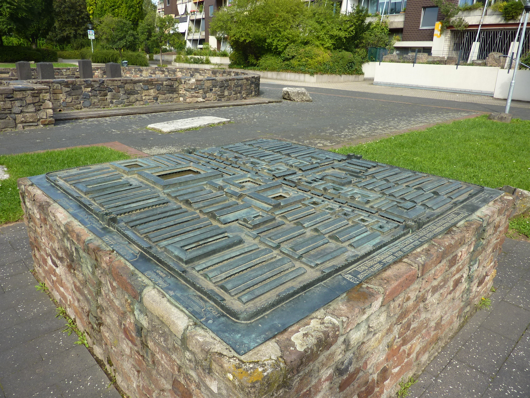 Grundmauern der Dietkirche im Innenhof der Wohnanlage Graurheindorfer Straße/Am Römerkastell/Drususstraße, Bonn-Castell: Grundriss des Bonner Kastells